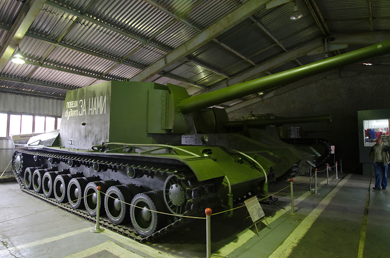 САУ СУ-100-Y в Музее бронетехники в Кубинке.